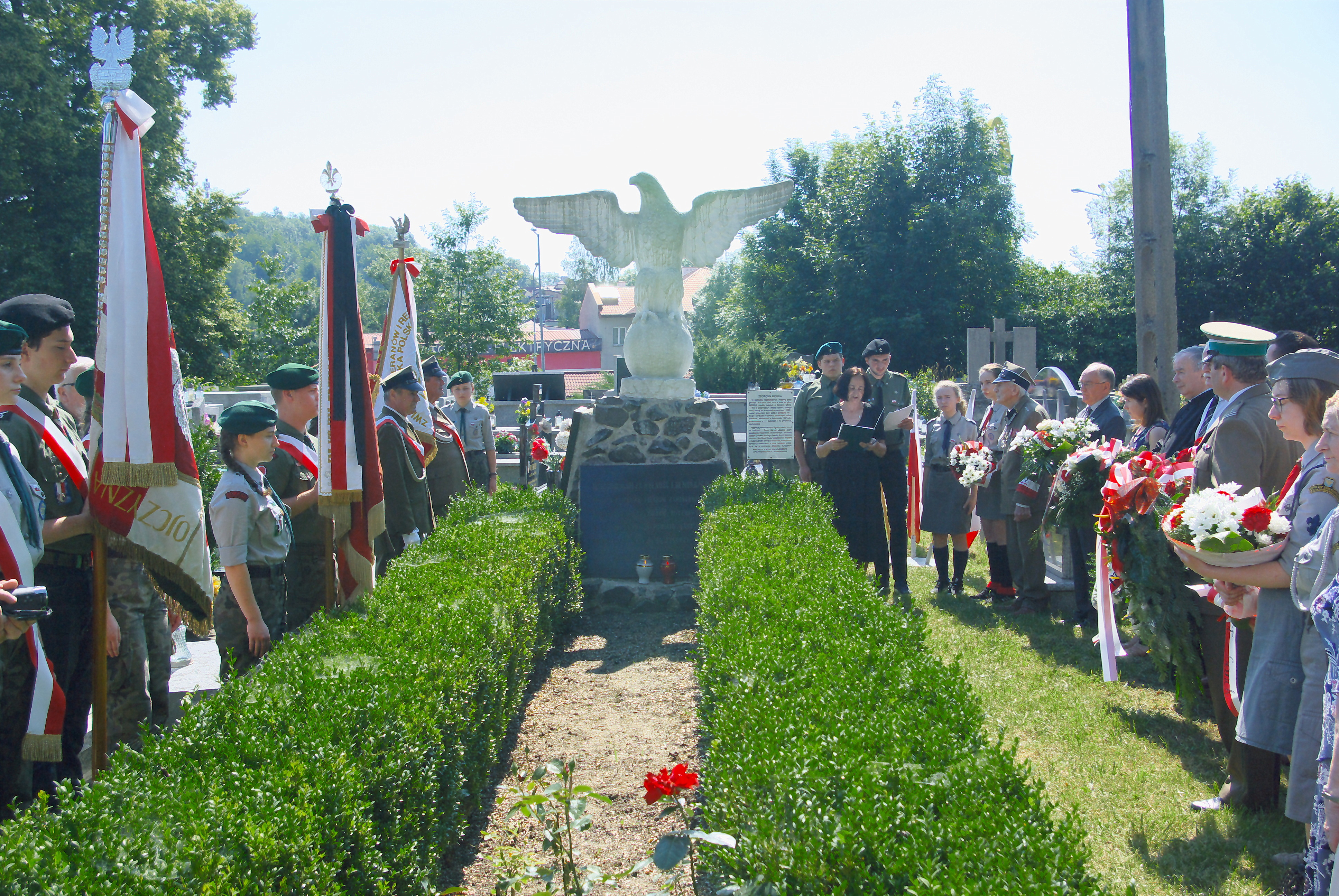 Uroczystości upamiętniające egzekucję na Gruszce z 1940 (2020)